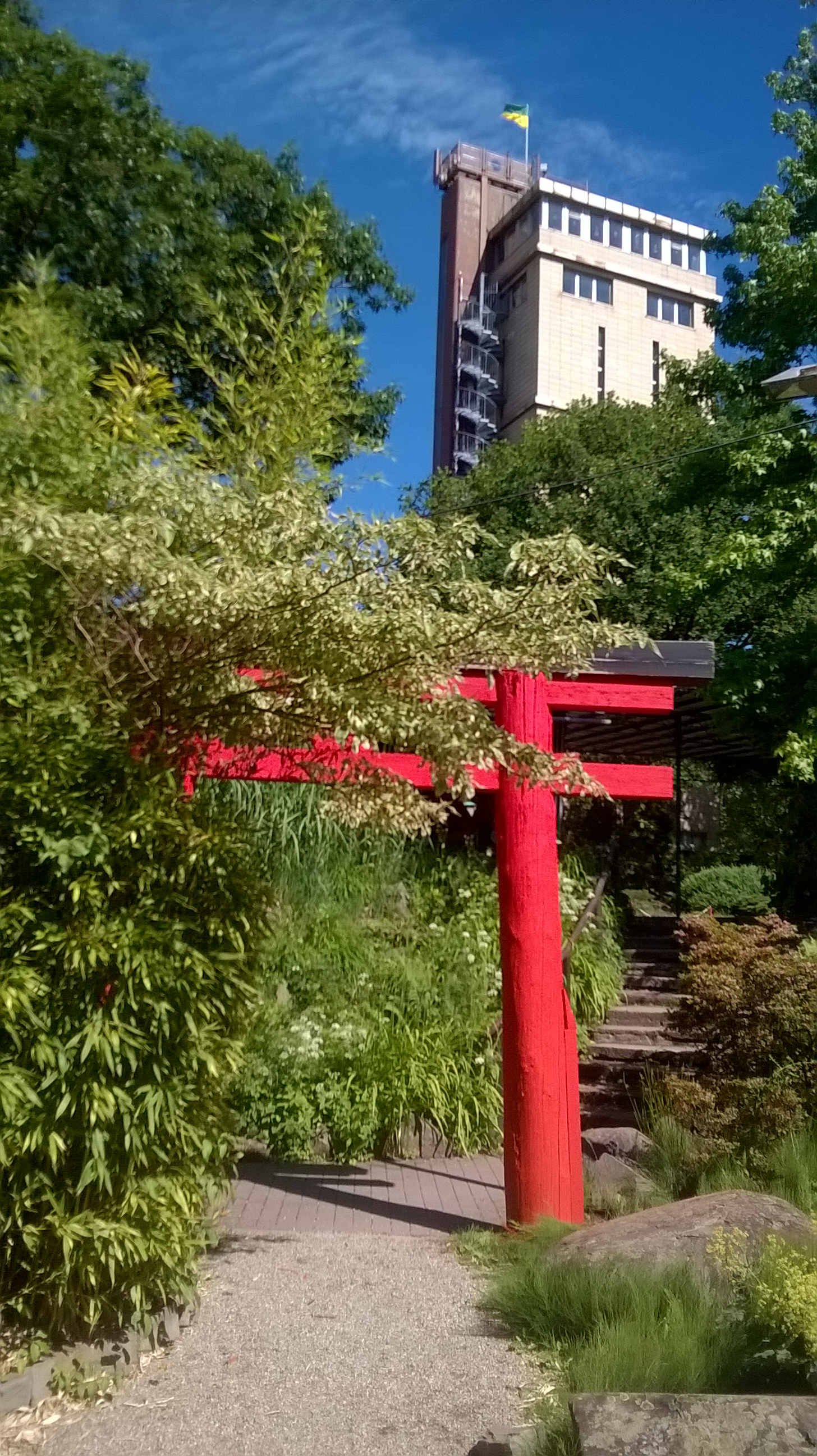 Eine Ansicht des Bexbacher Wasserturms, vom Blumengarten aus aufgenommen.